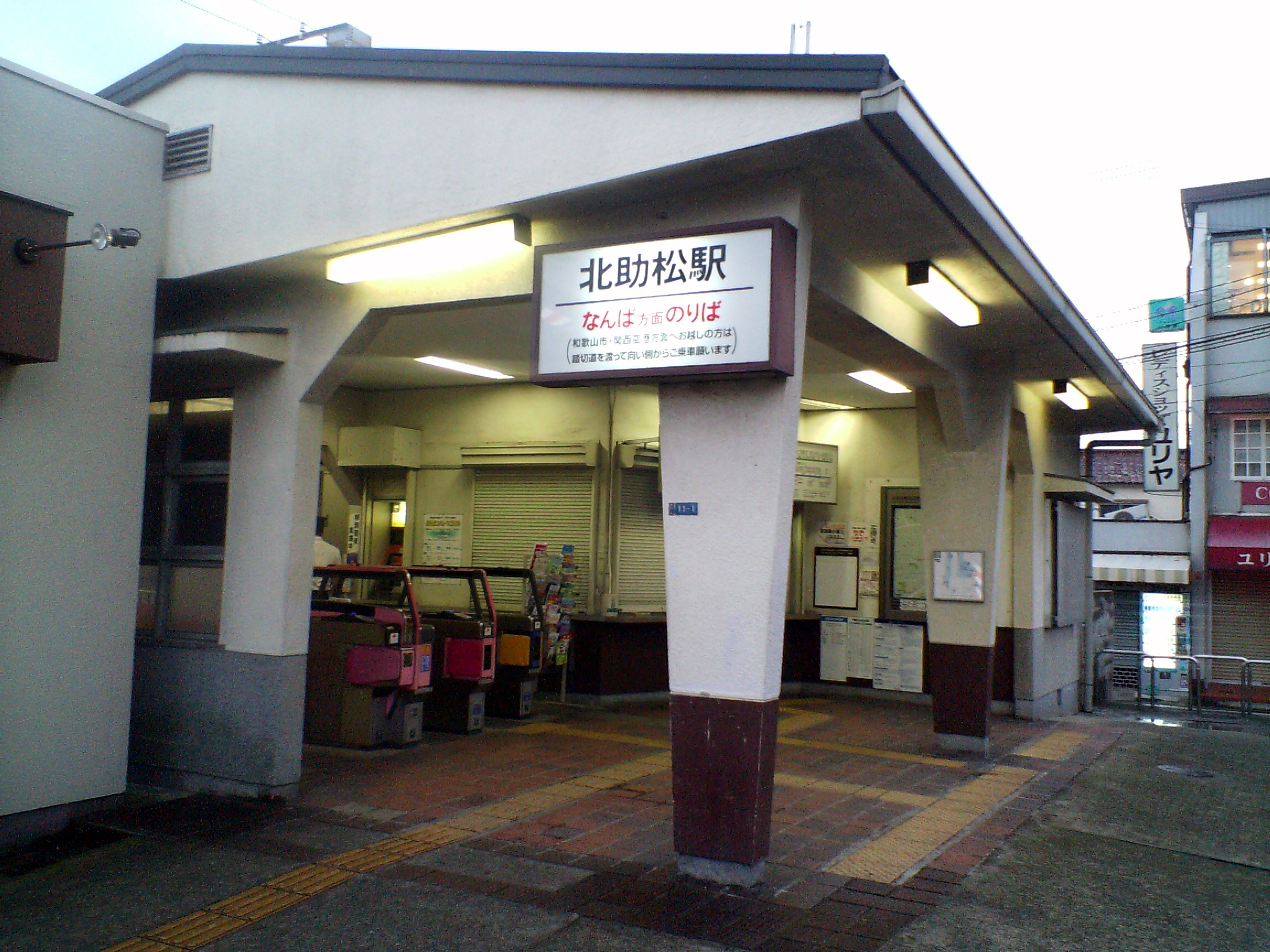 投稿者自身が南海本線『北助松』駅（大阪府泉大津市東助松町1-11-1）の難波方面乗り場を現地で撮影。 2007年（平成19年）07月10日（火）撮影 撮影機材：某メーカー製デジタルスチルカメラ 撮影者：阪神強いな